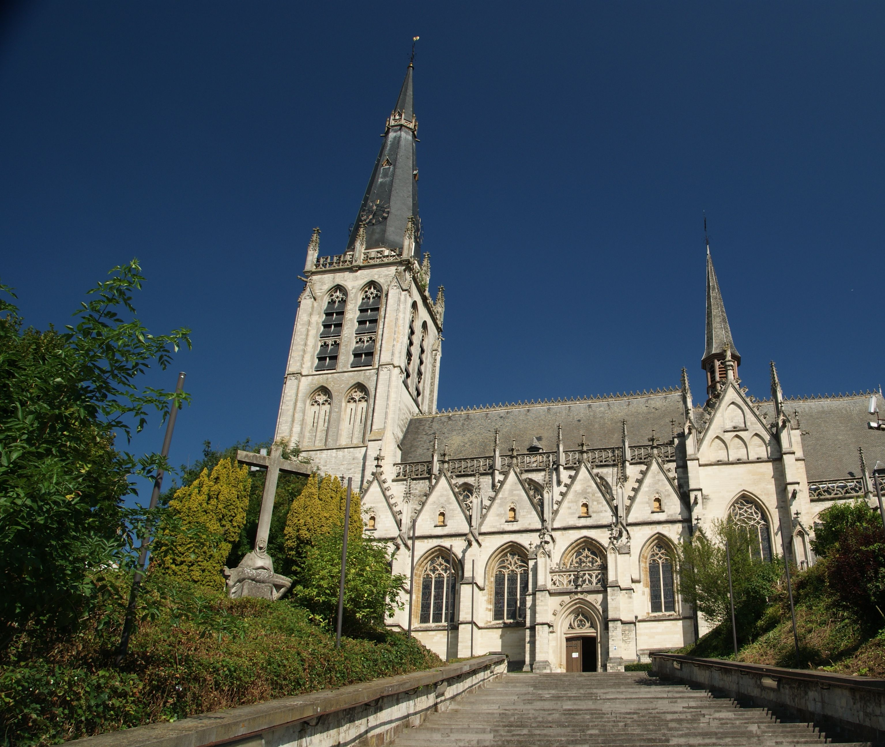 Eglise Notre-Dame